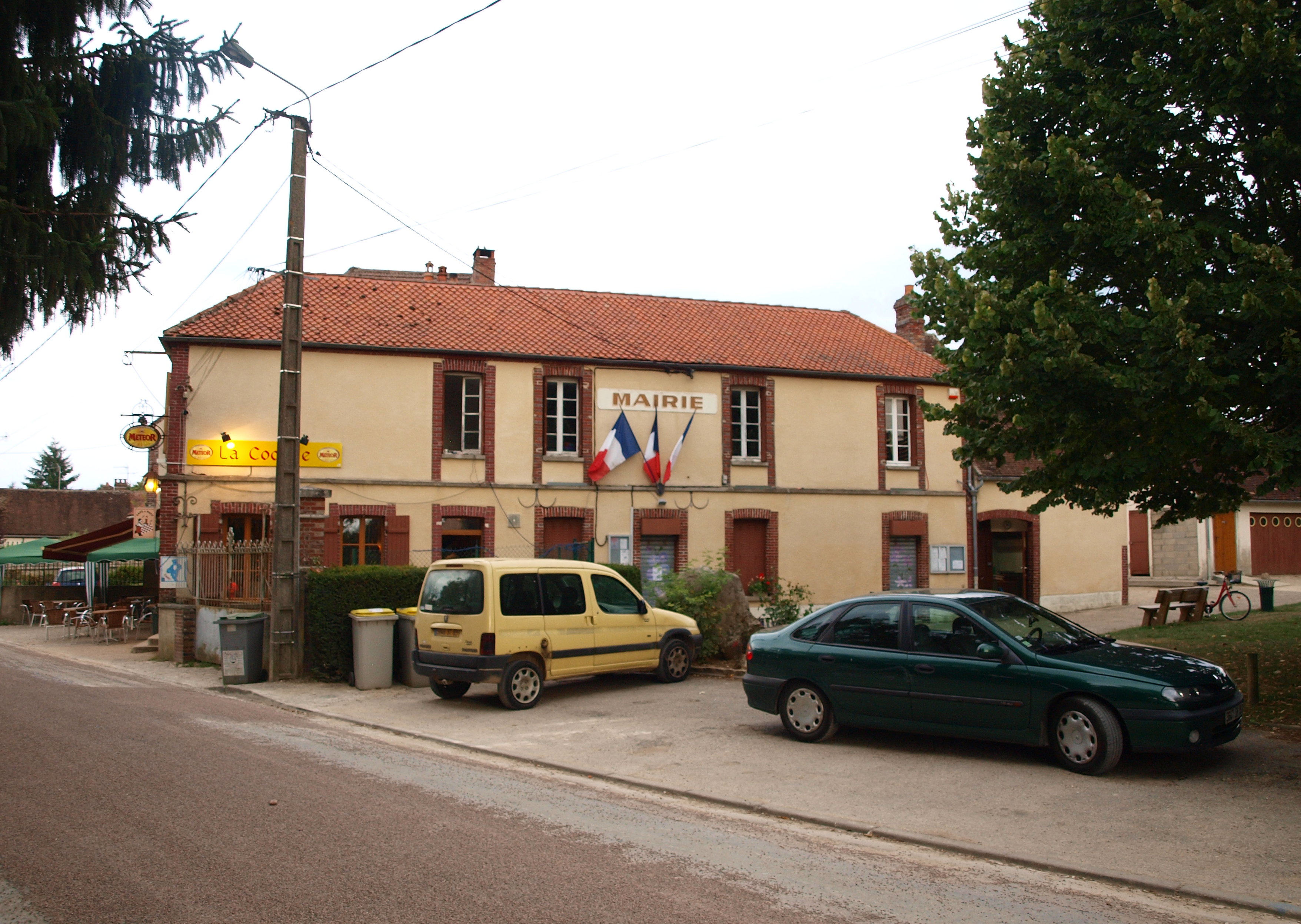 Passy (Yonne, France) ; la mairie & le bar-épicerie.